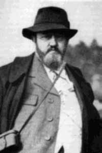 Porträt Ferdinand Avenarius.